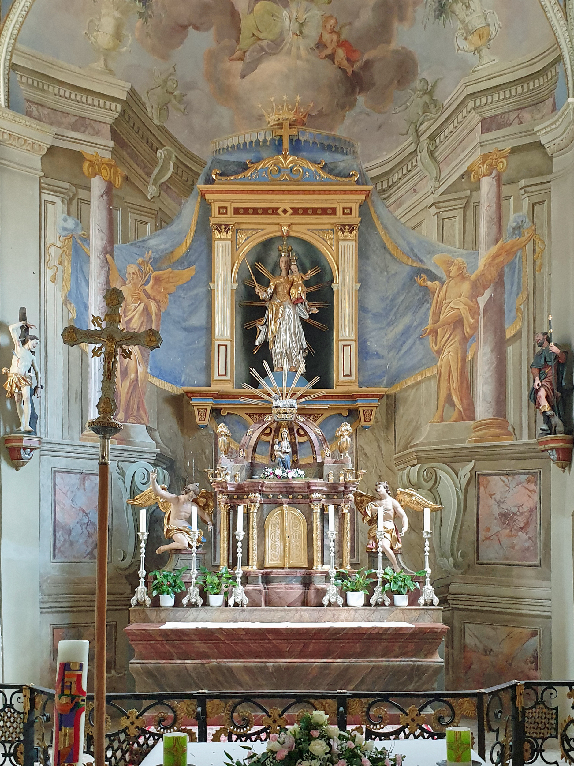 Hochaltar in der Frauenkirche in Bad Radkersburg.